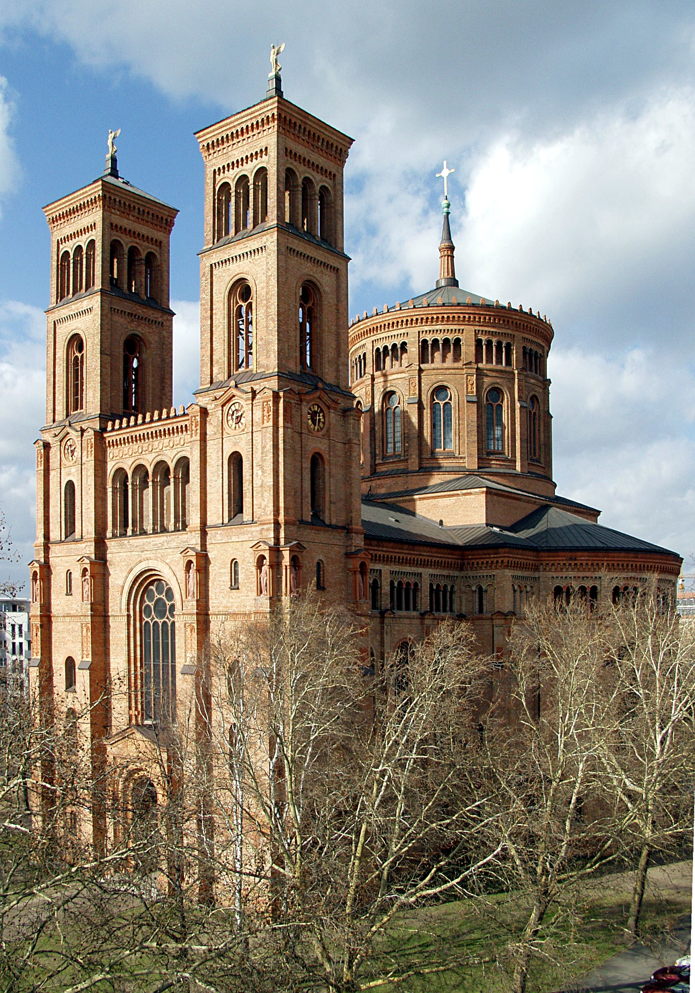 St.-Thomas-Kirche, Berlin-Kreuzberg, Portalansicht